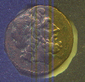 Foto di una moneta